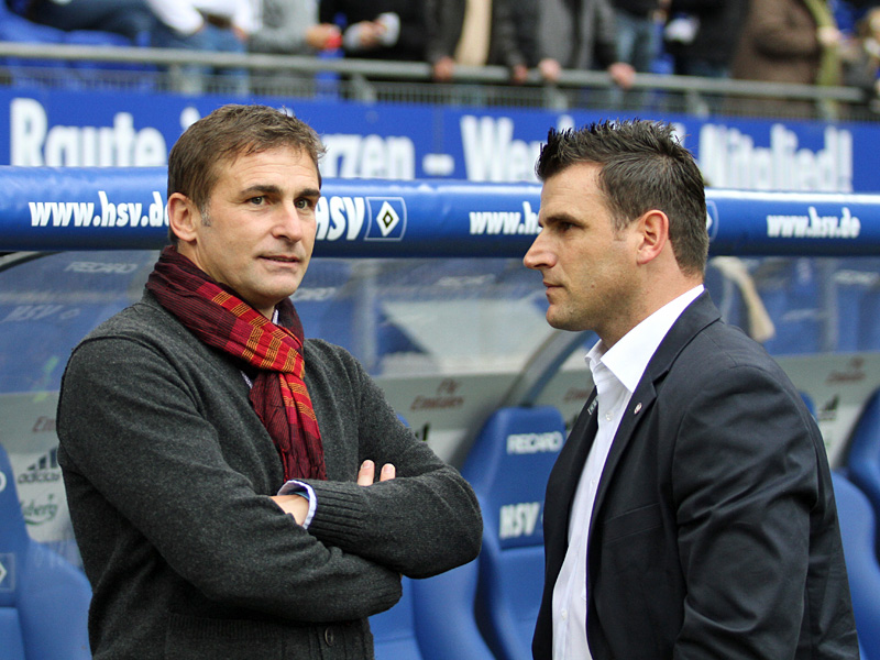 Stefan Kuntz mit Marco Haber im Volksparkstadion